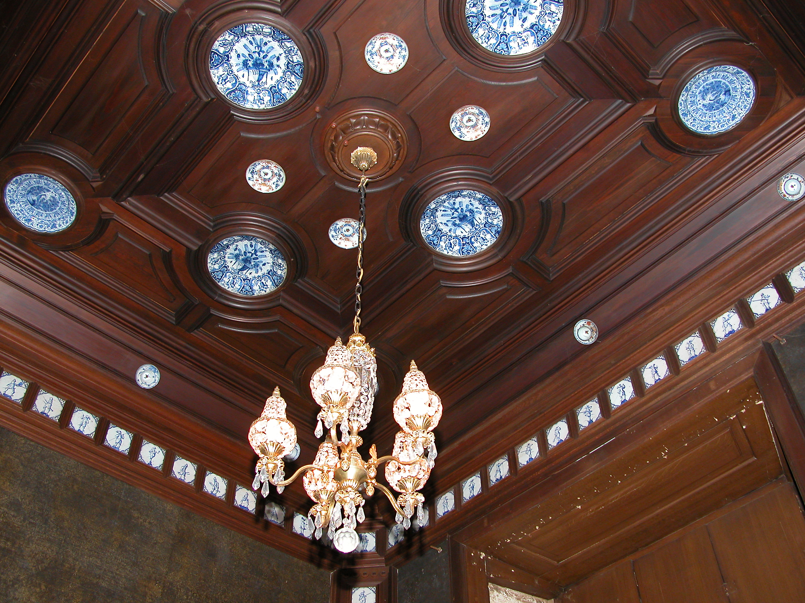 16.03.2008 02633 Gaußig: Schloß. Decke im Delfter Zimmer im Erdgeschoß. [DSCN31958.TIF]20080316550DR.JPG(c)Blobelt